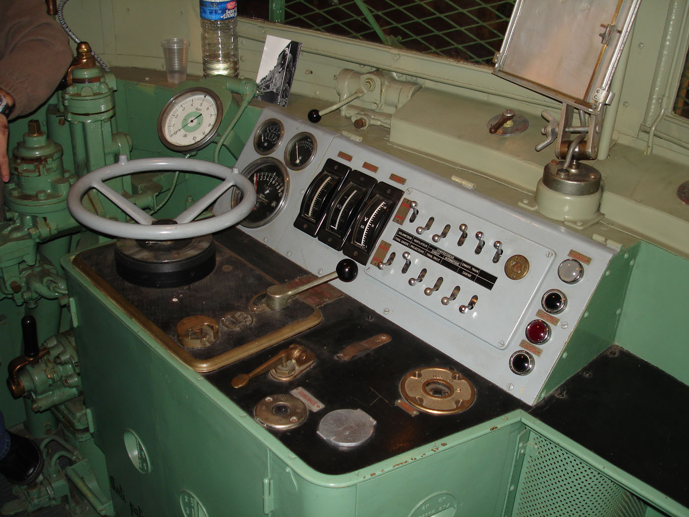 BB 9004, détentrice du record mondial de vitesse du 29 mars 1955 à 331km/h Nef du Grand Palais à Paris, France Décembre 2007 Photo personnelle (own work) de Clicsouris